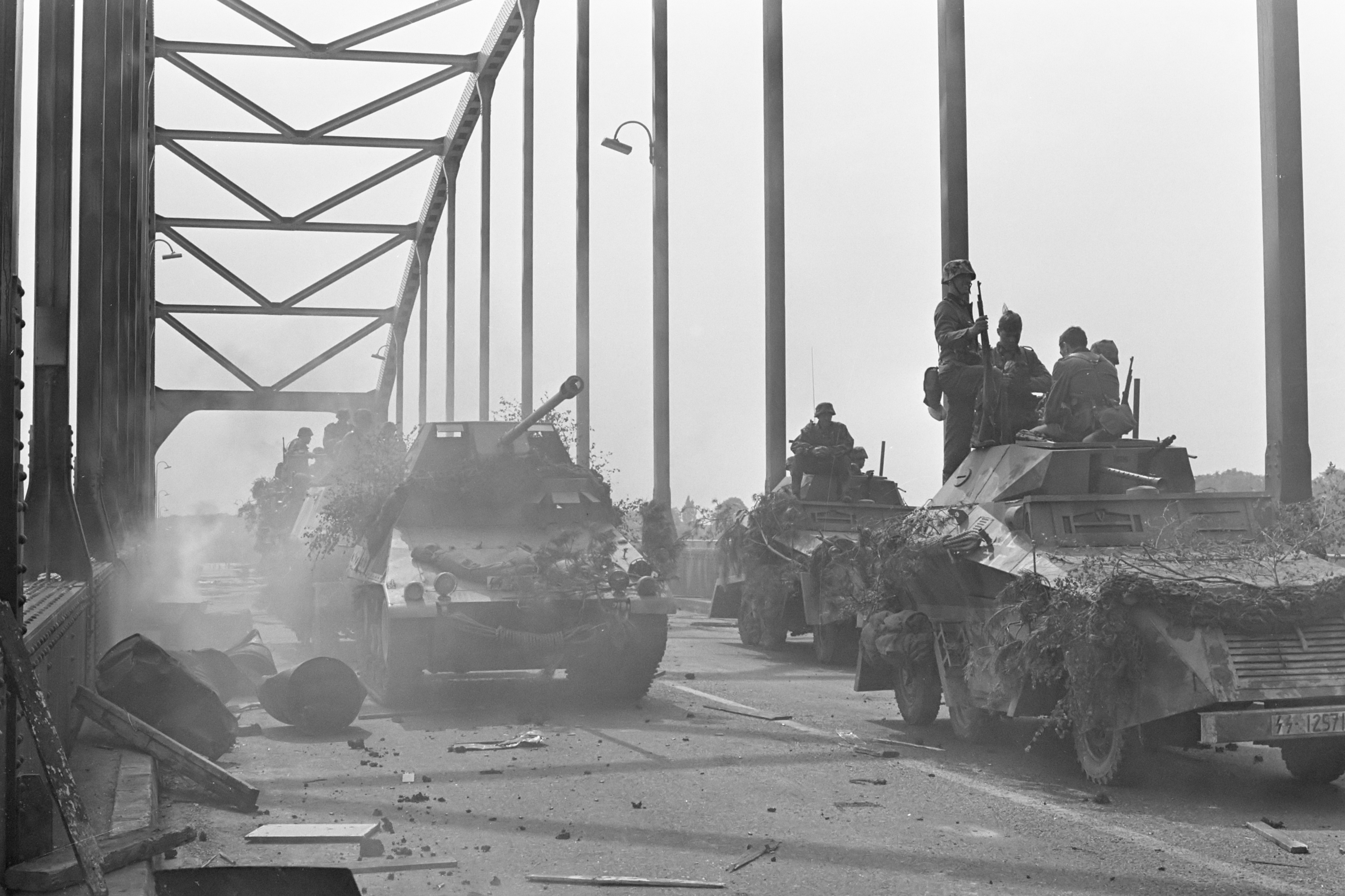 Filmopnamen " A bridge too far " in Deventer, soldaten trekken over de brug 18 mei 1976